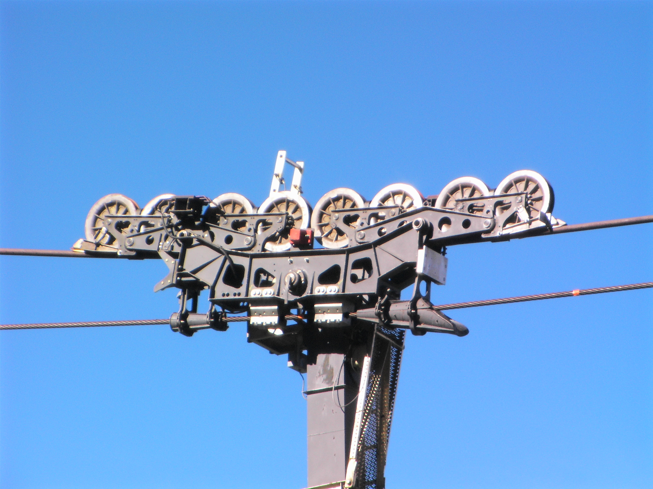 ATTENTION ! : C'est le Téléphérique de l'aiguille du Midi le 14 août 2008, France.